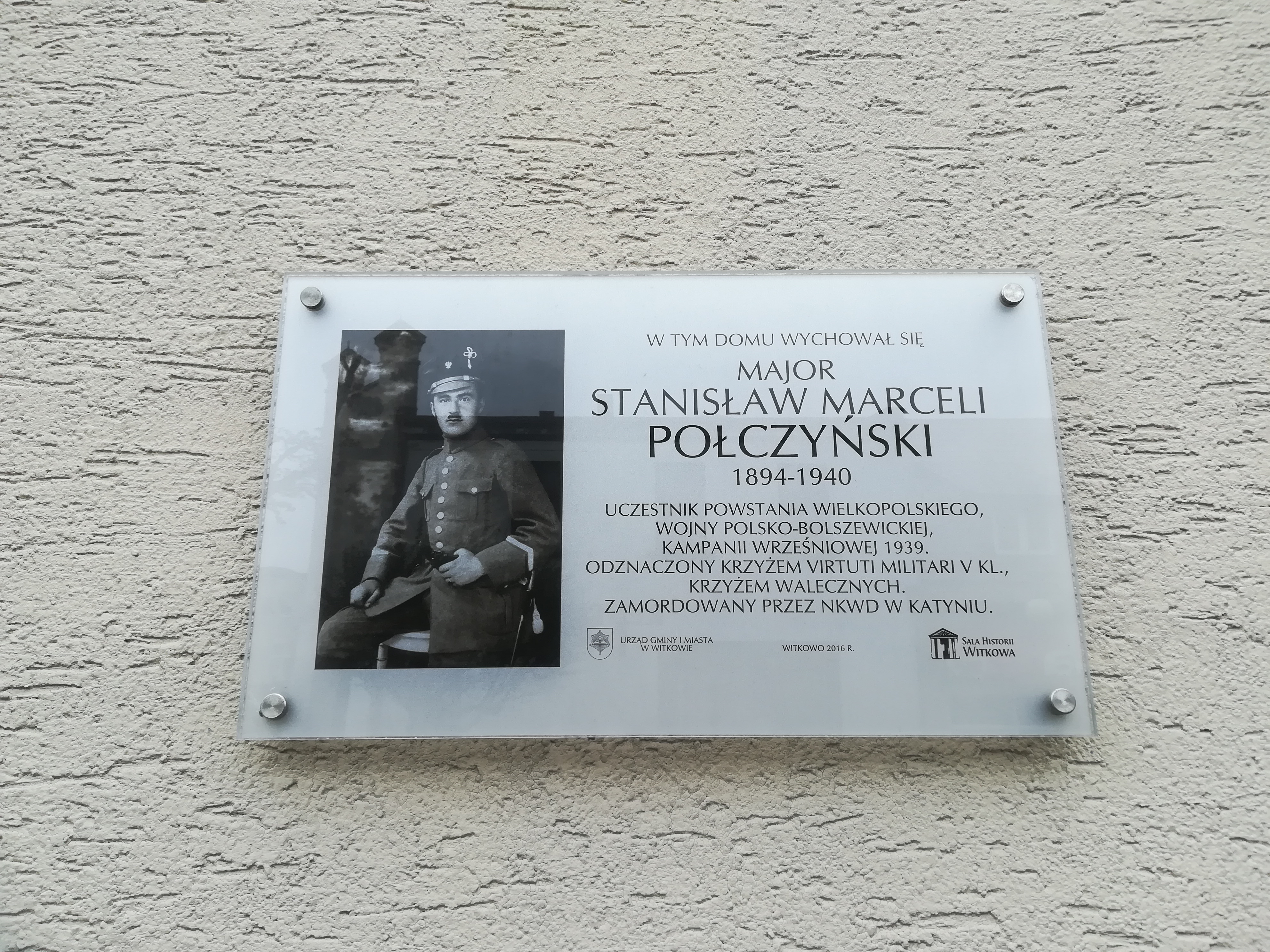 Rynek w Witkowie.